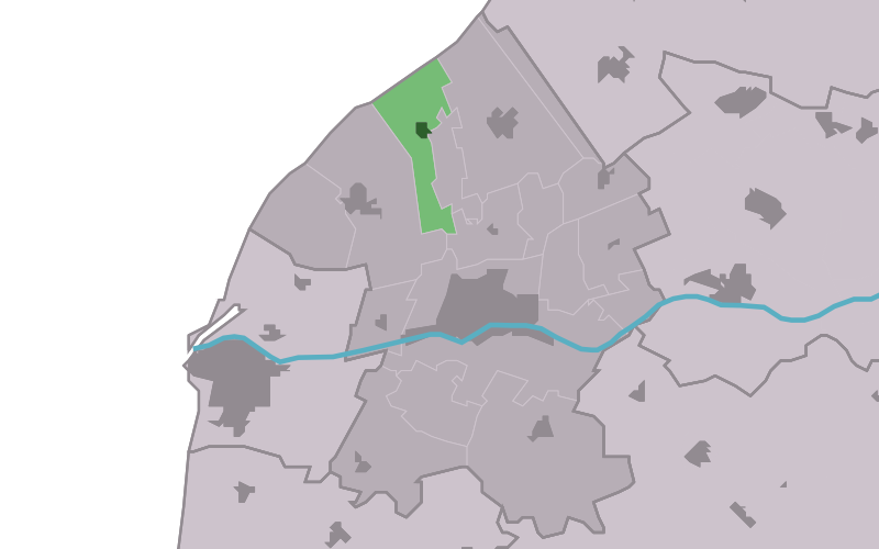 Kaartsje fan himrik fan Easterbierrum